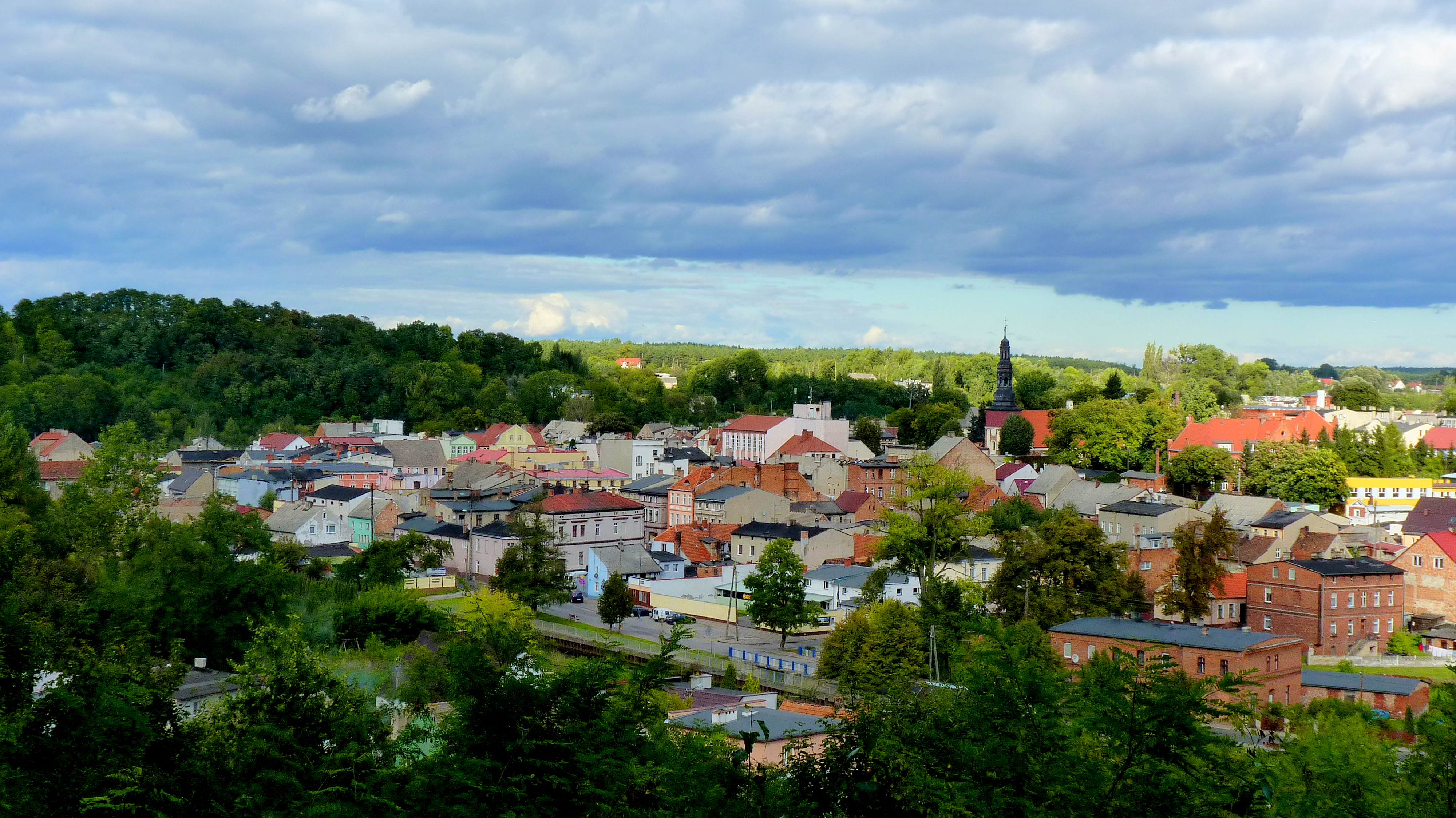 Polska ,Koronowo - widok miasta z punktu widokowego nr 15